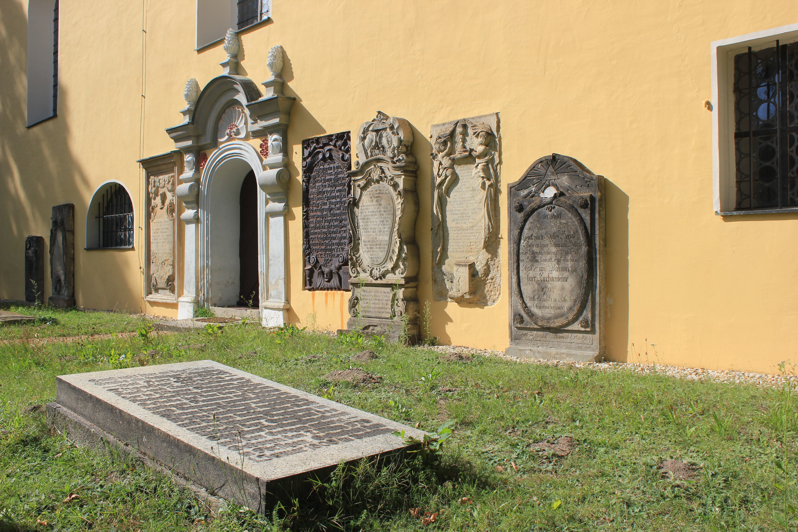 Hornjoserbsce: Row molerja Hendricha Božidara Wjele w Chrjebi, wokrjes Zhorjelc.